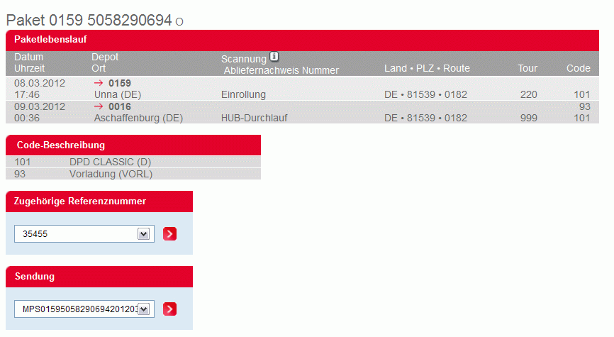 Sendungsverfolgung (DPD), genannt Paketlebenslauf